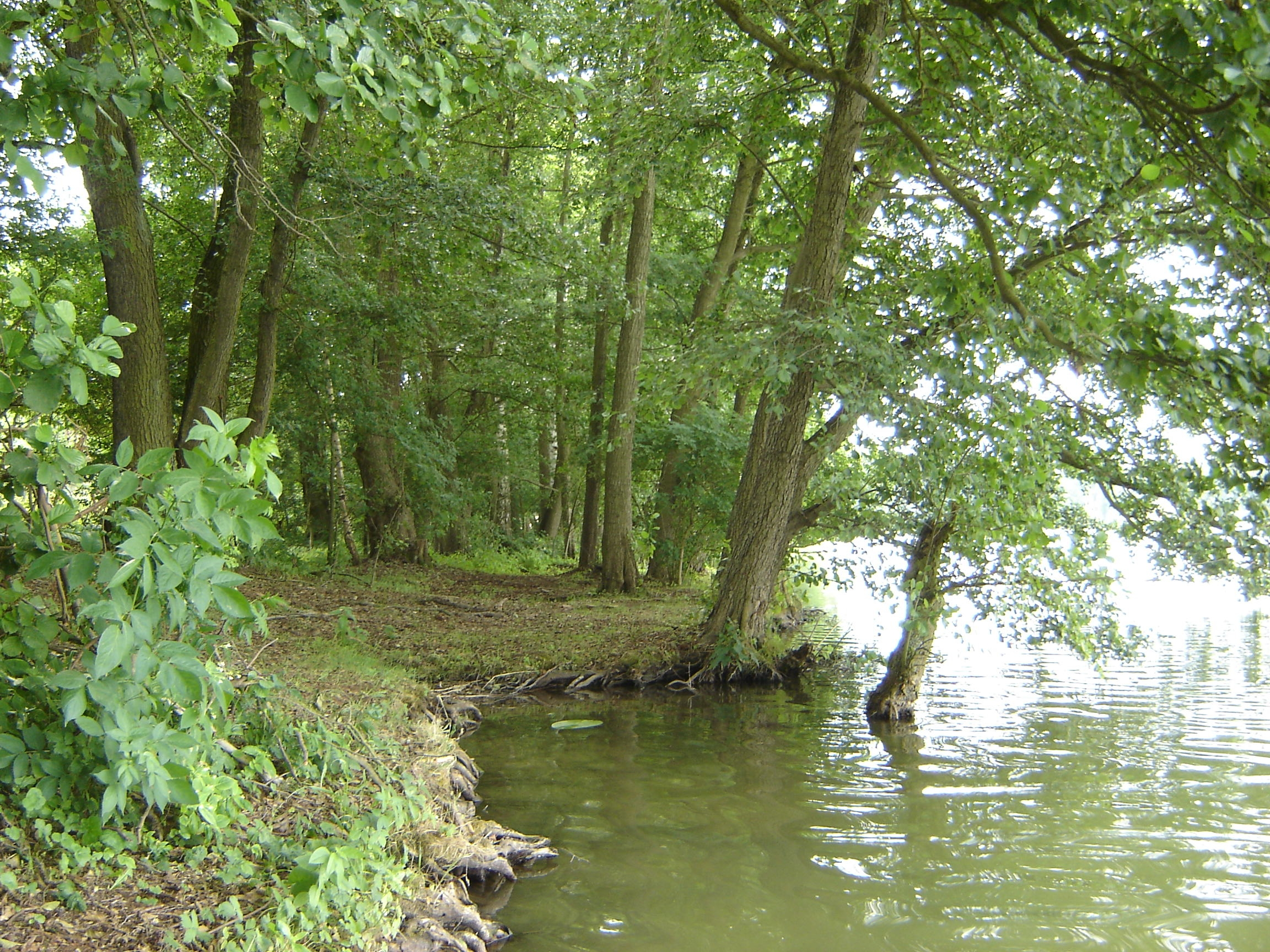 Der Maxsee im Landkreis Märkisch-Oderland (Brandenburg). Object location52° 28′ 09.94″ N, 13° 59′ 50.9″ E